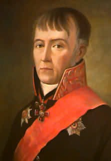 Голицын, Михаил Николаевич (1757-1827)